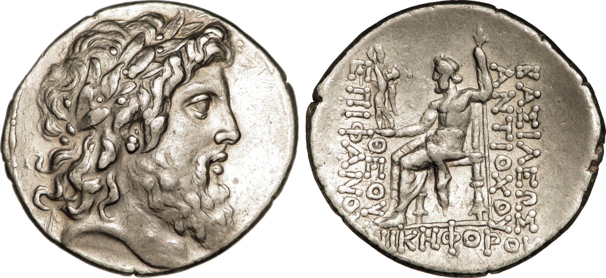 Nom de l'atelier : Syrie, Antioche Métal : argent Diamètre : 29mm Axe des coins : 12h. Poids : 16,73g. Titulature avers : Anépigraphe. Description avers : Tête barbue et laurée de Zeus à droite entourée de la stemma. Description revers : Zeus Olympios nicéphore assis à gauche sur un siège sans dossier, nu jusqu'à la ceinture, tenant de la main droite une Niké et de la gauche un sceptre long. Légende revers : BASILEWS/ ANTIOCOU - QEOU/ EPIFANOUS// NIKHFOROU Traduction revers : (Du roi Antiochus divin glorieux victorieux).